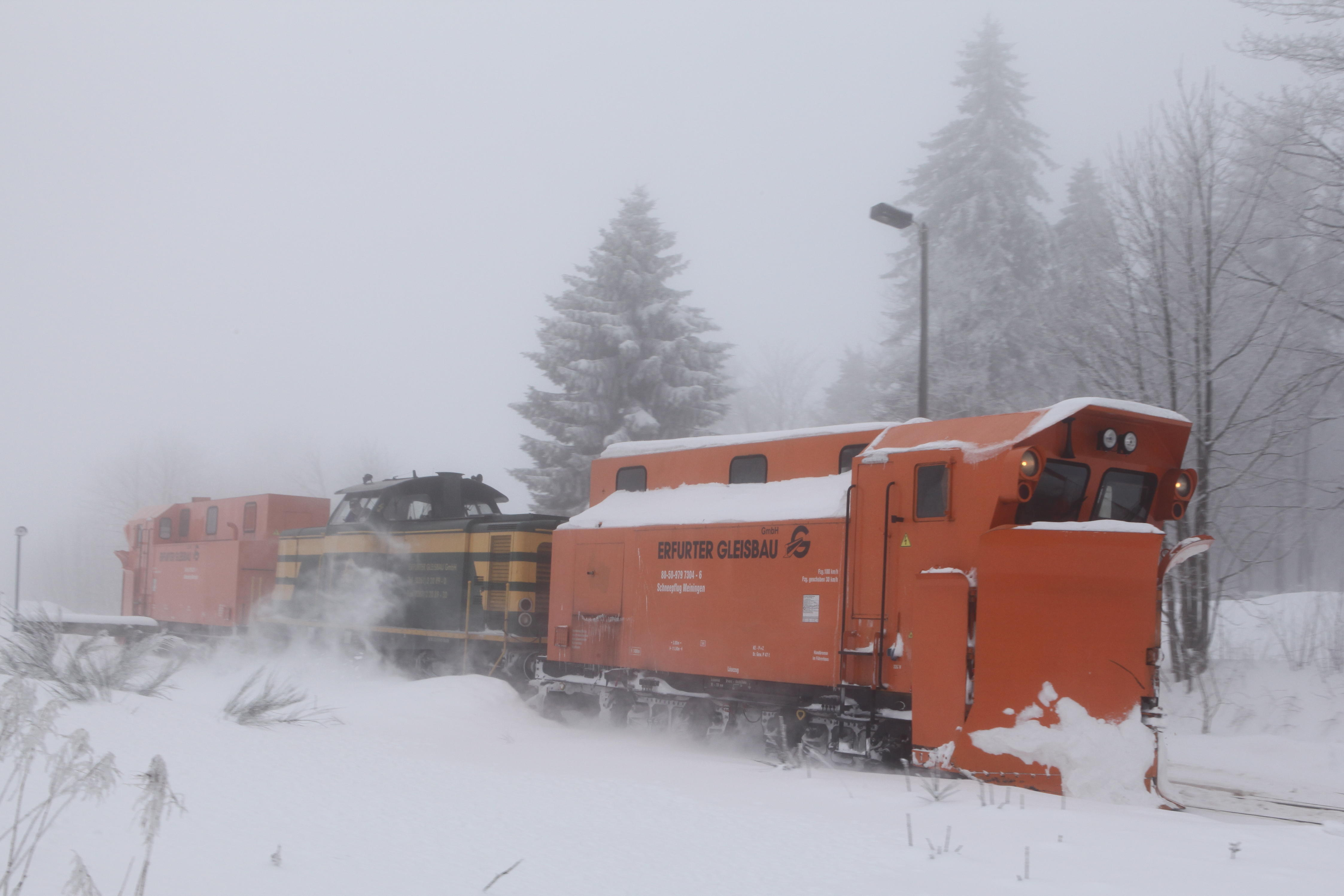 Zwei Schneepflüge der Bauart Meiningen und Lokomotive 211 074 bei Ernstthal am Rennsteig